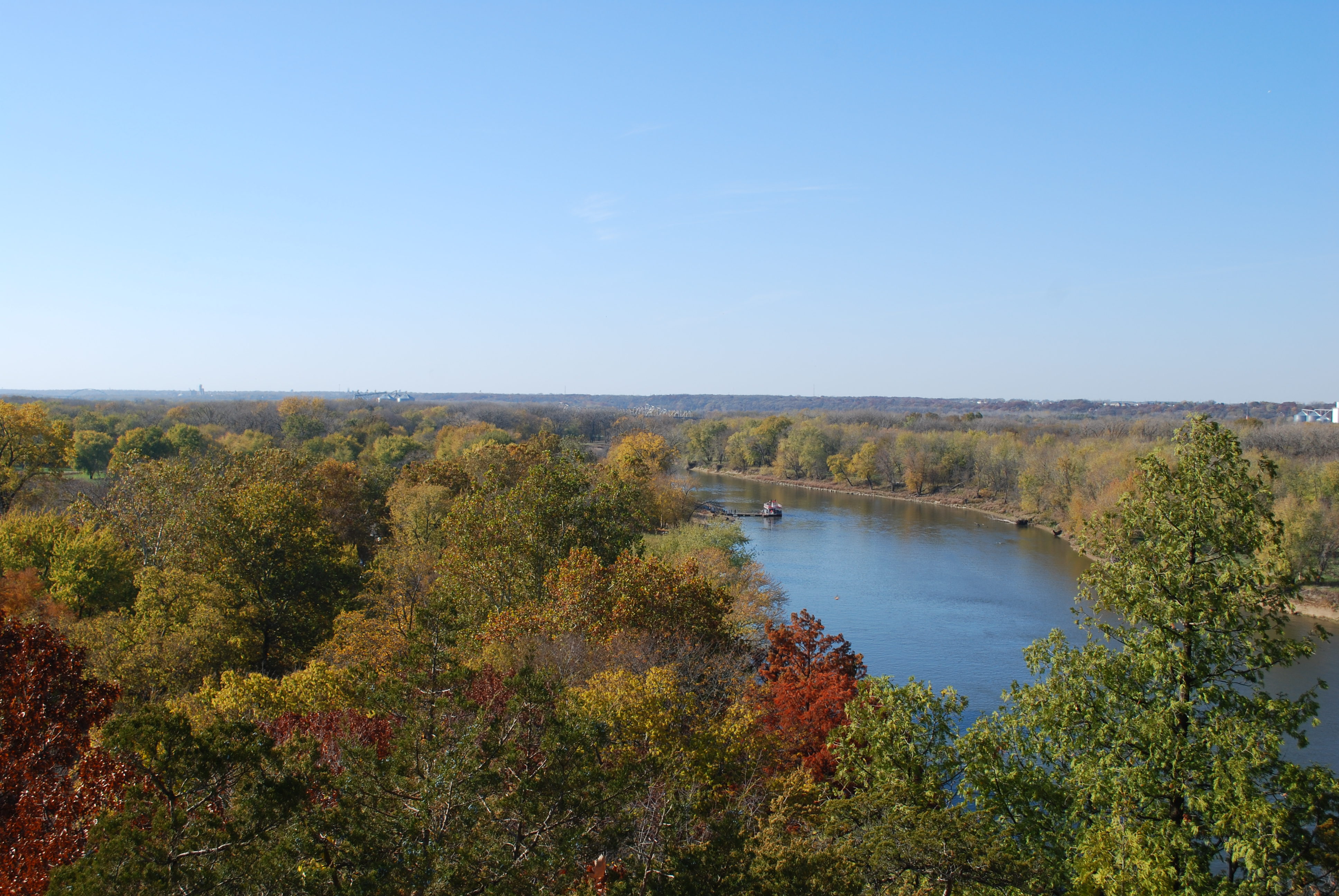 Illinois River